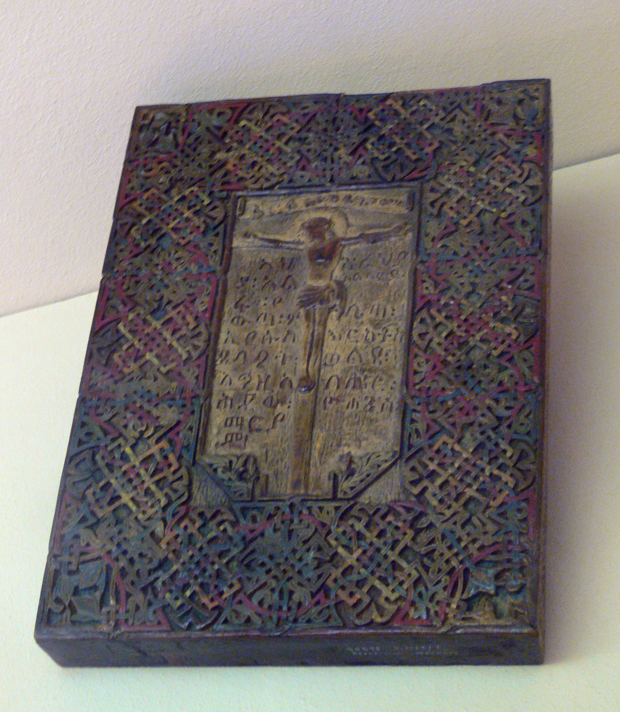 Stuttgart, Linden-Museum Tabot (Wiedergabe der Bundeslade), Holz, Amhara, Äthiopien, Inv. Nr. 90290